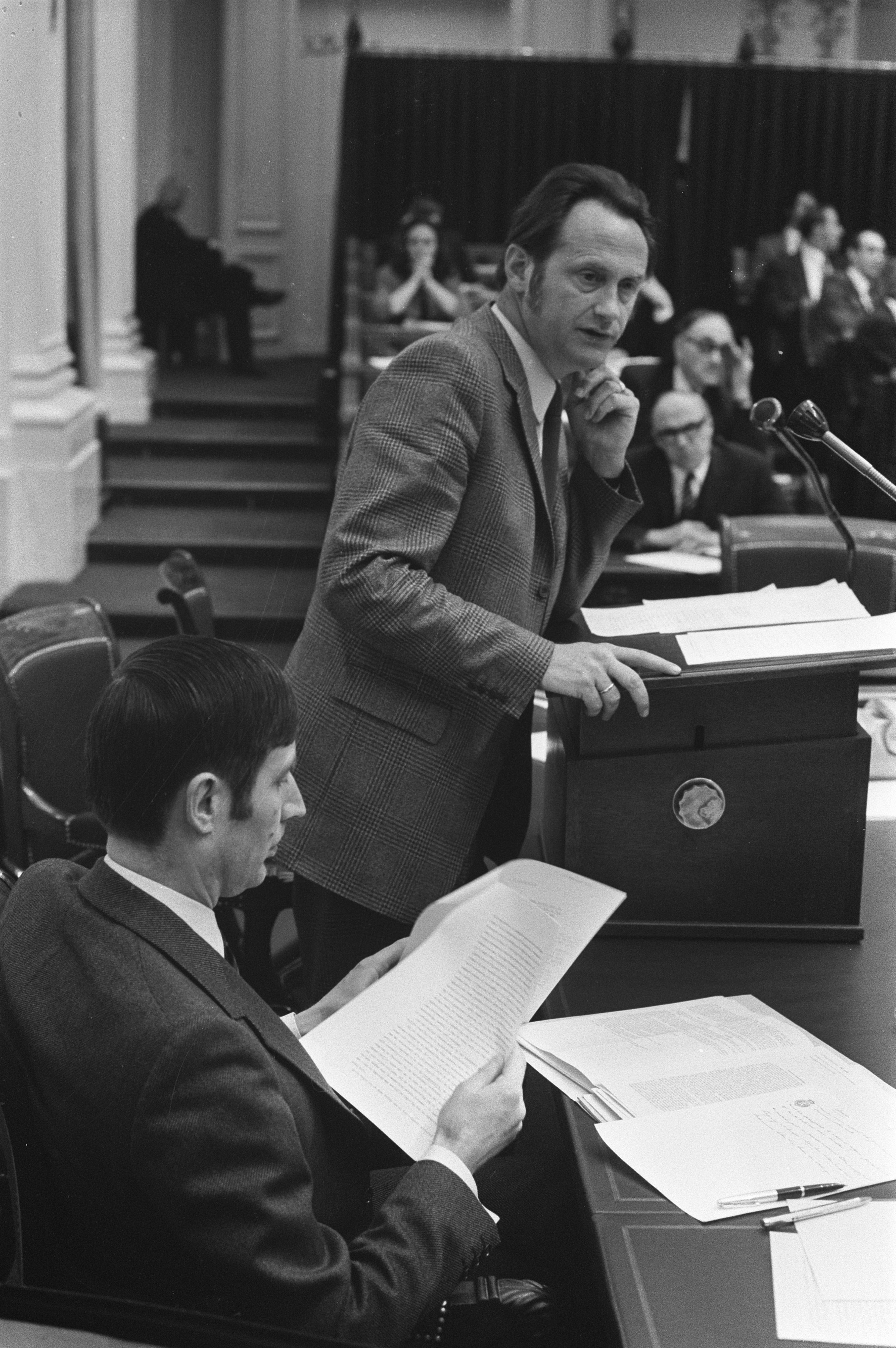 Collectie / Archief : Fotocollectie Anefo Reportage / Serie : [ onbekend ] Beschrijving : Tweede Kamerdebat over de uitspraak van rechter Stheeman over een stakingsverbod voor de metaalsector; minister van Sociale Zaken Boersma en minister van Justitie Van Agt (l) Datum : 16 februari 1972 Locatie : Den Haag, Zuid-Holland Trefwoorden : ministers, parlementaire debatten, politiek Persoonsnaam : Agt, Dries van, Boersma, Jaap Fotograaf : Verhoeff, Bert / Anefo Auteursrechthebbende : Nationaal Archief Materiaalsoort : Negatief (zwart/wit) Nummer archiefinventaris : bekijk toegang 2.24.01.05 Bestanddeelnummer : 925-3895